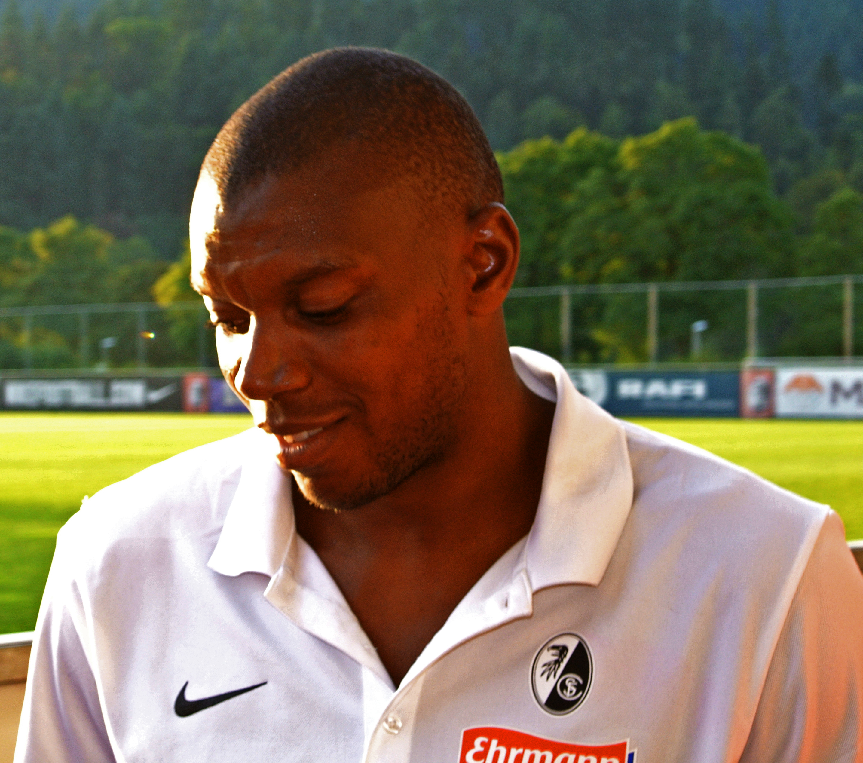 Karim Guédé nach dem Saisonseröffnungsspiel des SC Freiburg gegen Athletico Bilbao am 27. Juli 2013